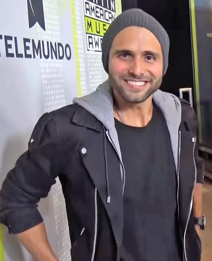 🍭 Christian Daniel canta acapella "Ahora Que Te Vas" y "Loco Enamorado" FT. Abraham Mateo, Farruko by Dulce Osuna